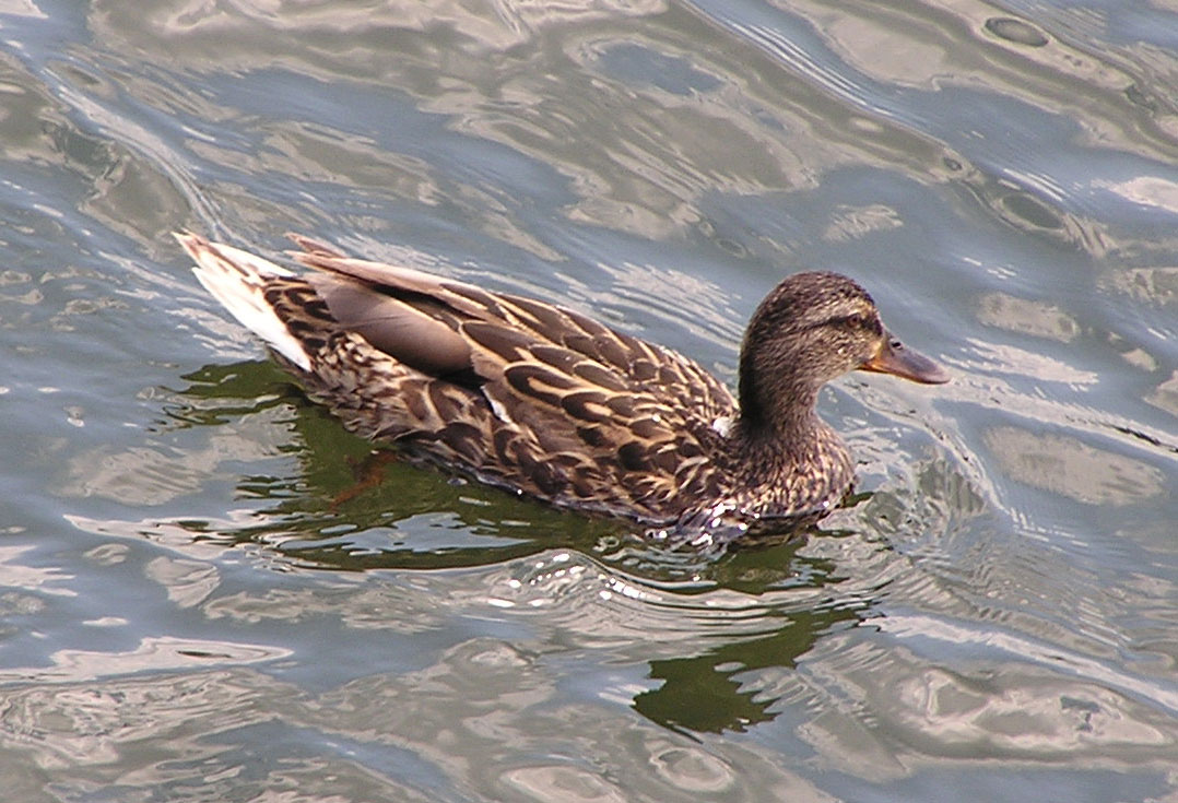 Anas platyrhynchos